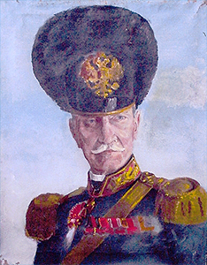 Portræt af Paul Goudime-Levkowitch, malet af Preben Kannik, Tøjhusmuseet